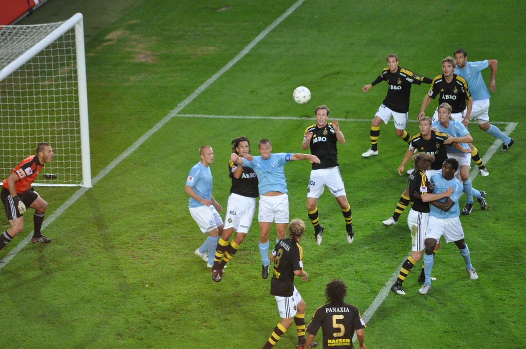 Premiär med min nya kamera. Match i Fotbollsallsvenskan mellan MFF och AIK (0-0) på Swedbank Arena. Provade ett par "skott" mot mål med mitt 55-200mm objektiv ;-)